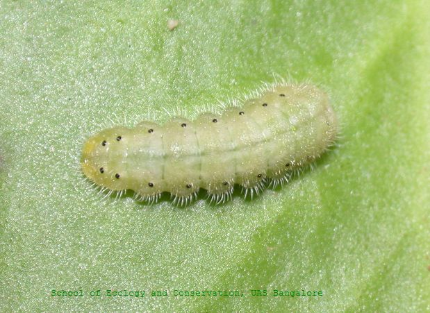 Talicada nyseus caterpillar, India